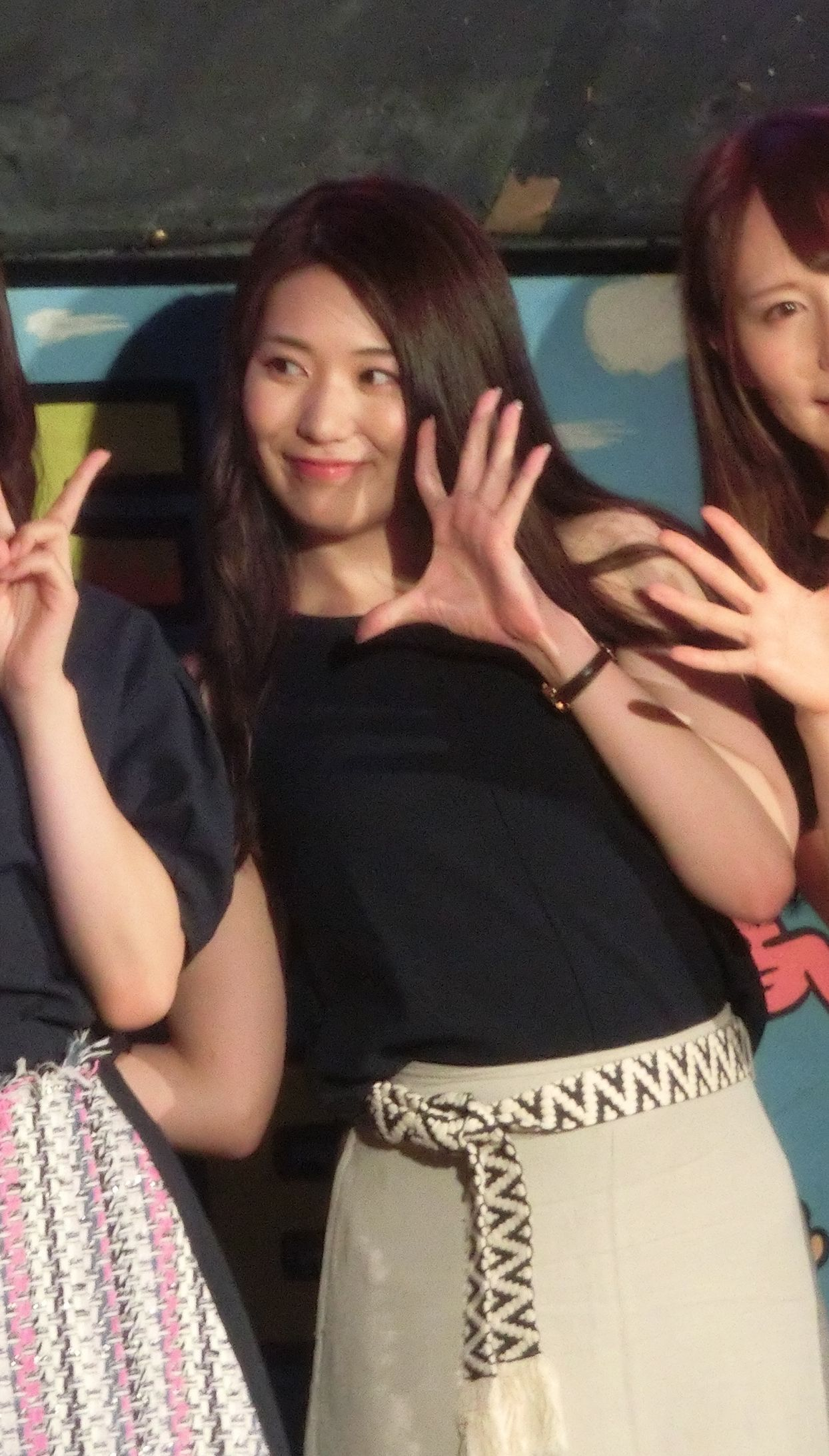 This file has been extracted from another file: KajifesCIMG3734.jpg